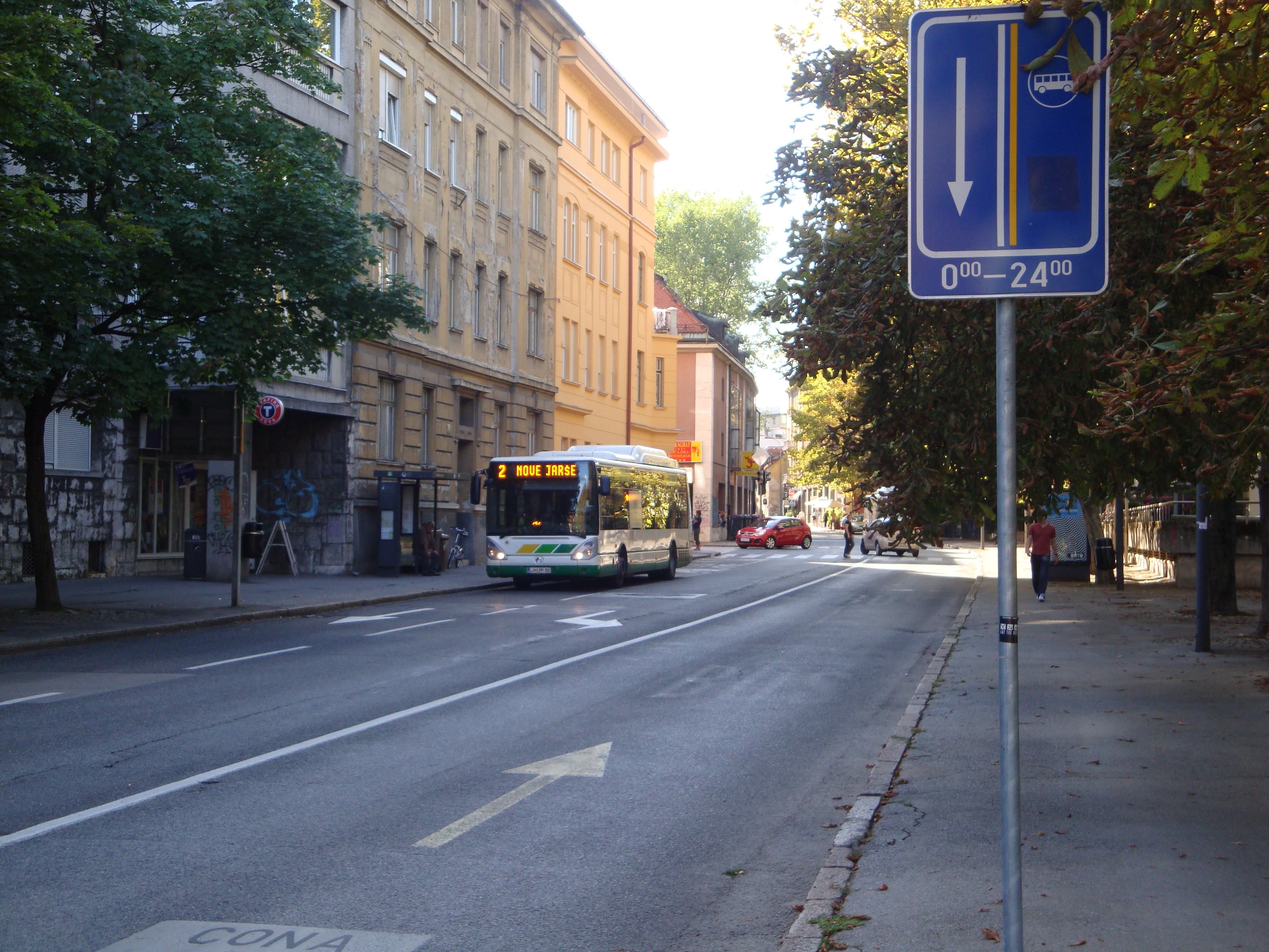 Avtobus LPP na Poljanski cesti, Ljubljana